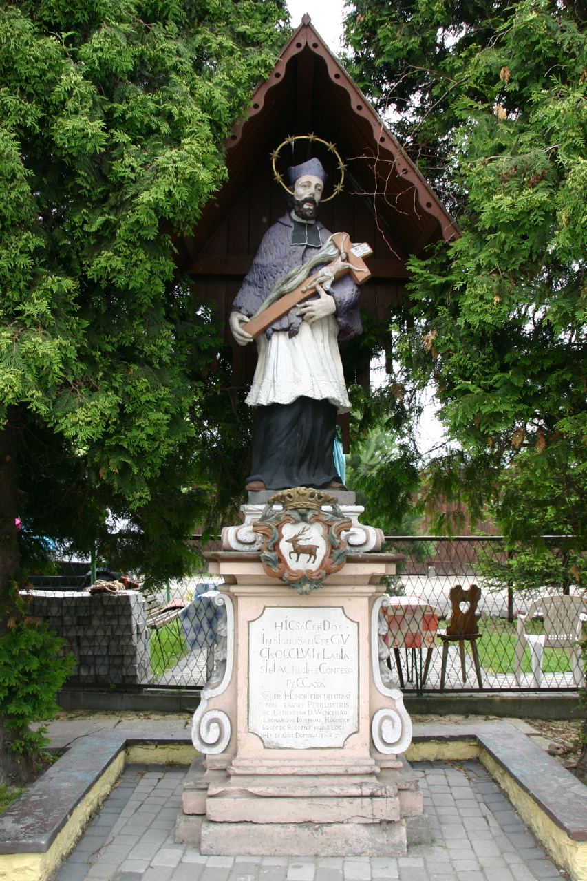 Dąbrówka Górna (Dombrowka a. d. Oder) – wieś w Polsce położona w województwie opolskim, w powiecie krapkowickim, w gminie Krapkowice.